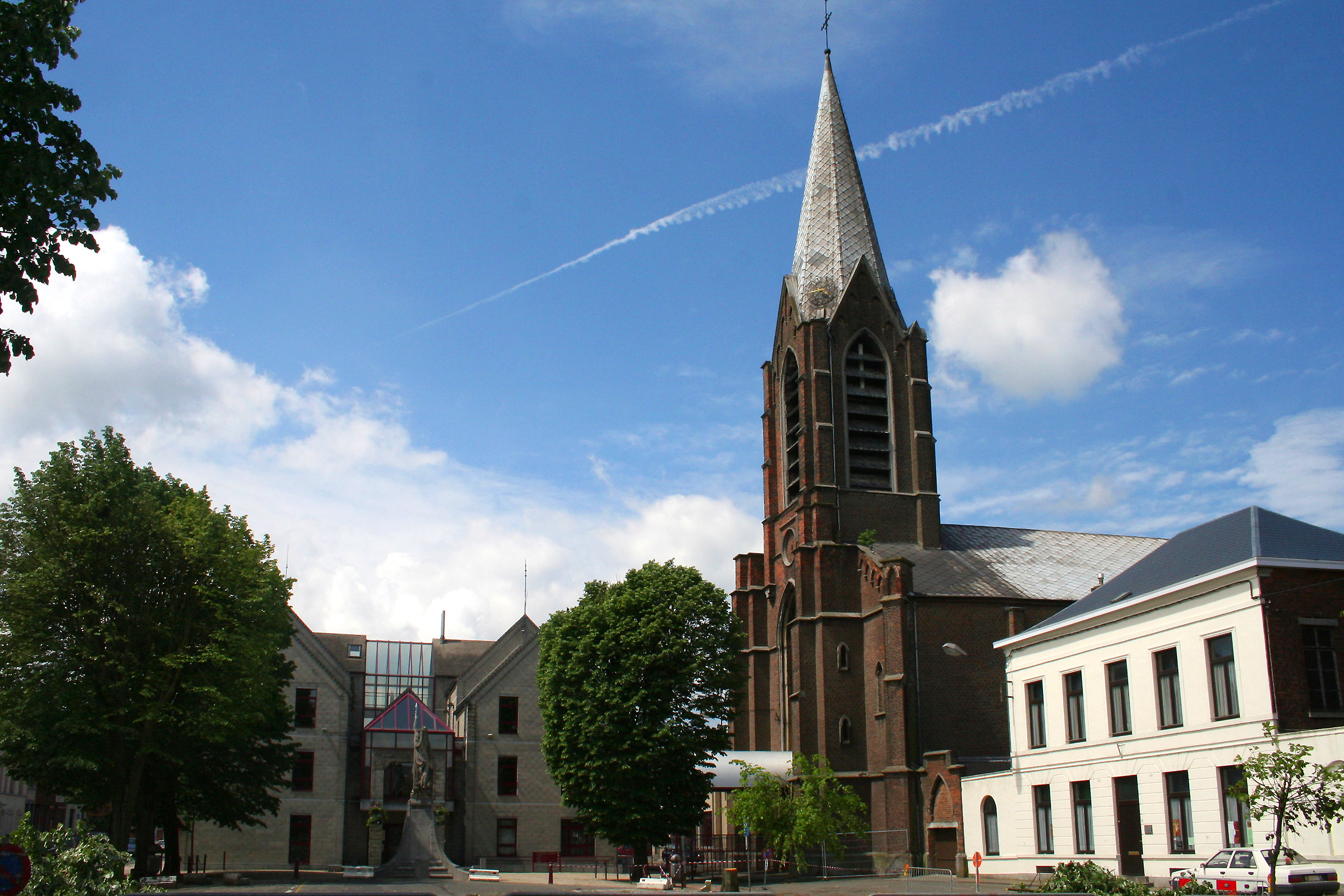 Fayt-lez-Manage, Place Albert 1er - L'église Saint-Gilles. Walon: Fayi-adlé-Manadje, Place Albert I - L'èglîje Saint-Djille.